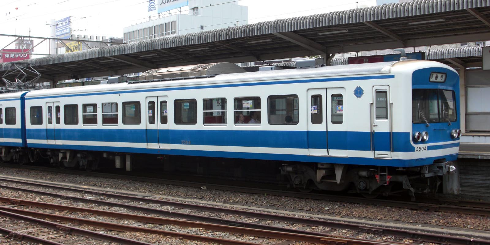 伊豆箱根鉄道駿豆線、クハ3000形電車（クハ3004）、三島駅にて撮影